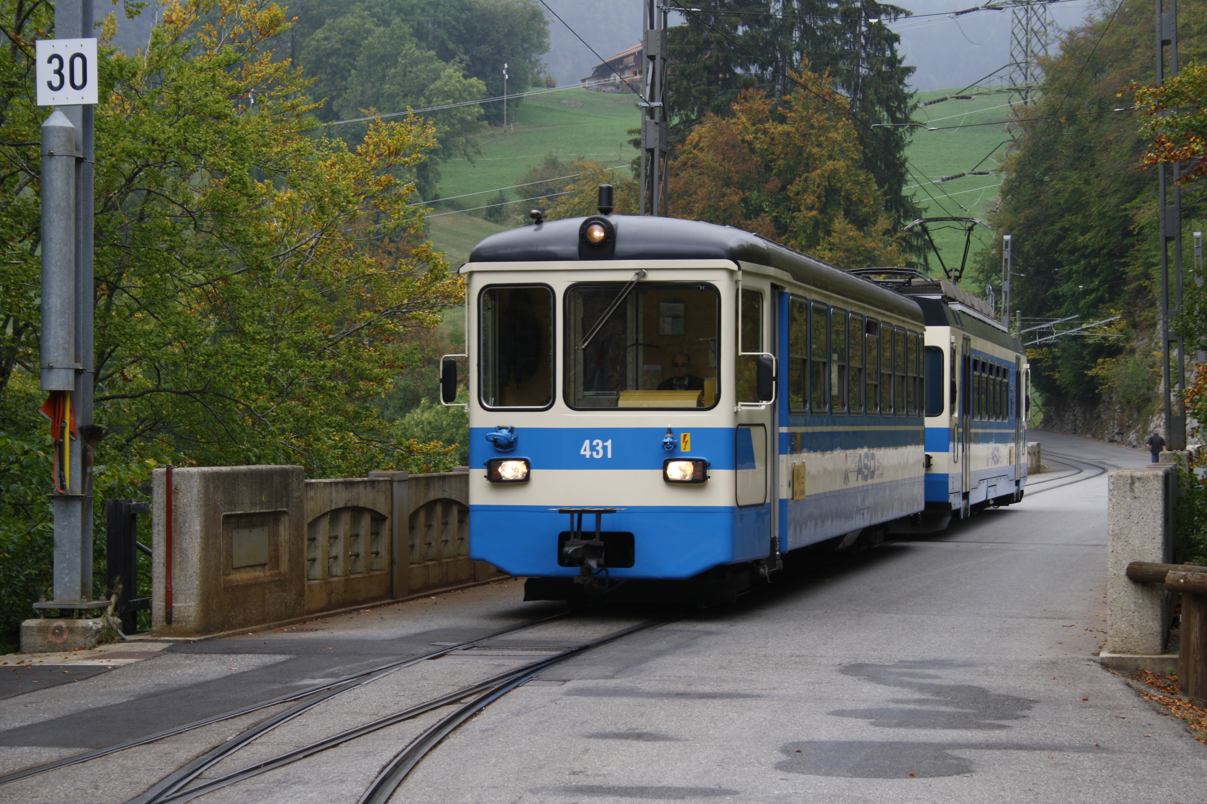 Zug der ASD in Les Planches